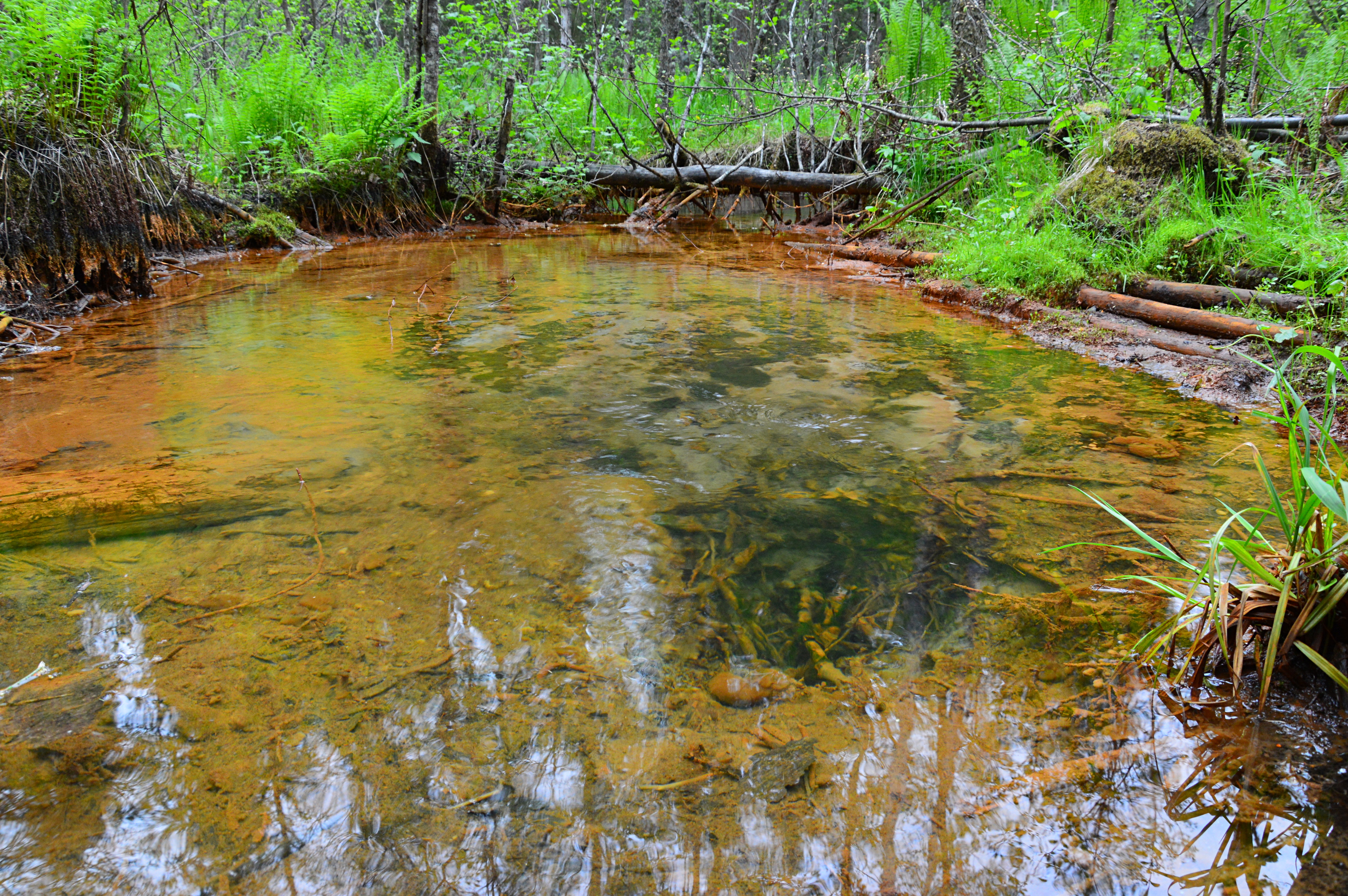 Rebasmäe allikas.